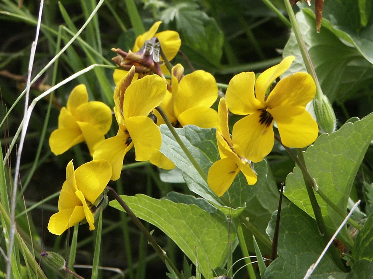 Santa Rosa Plateau Riverside Co., CA